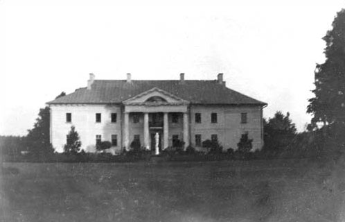 Беларуская (тарашкевіца): Обаль (Obal), палац Грабніцкіх (Hrabnicki)